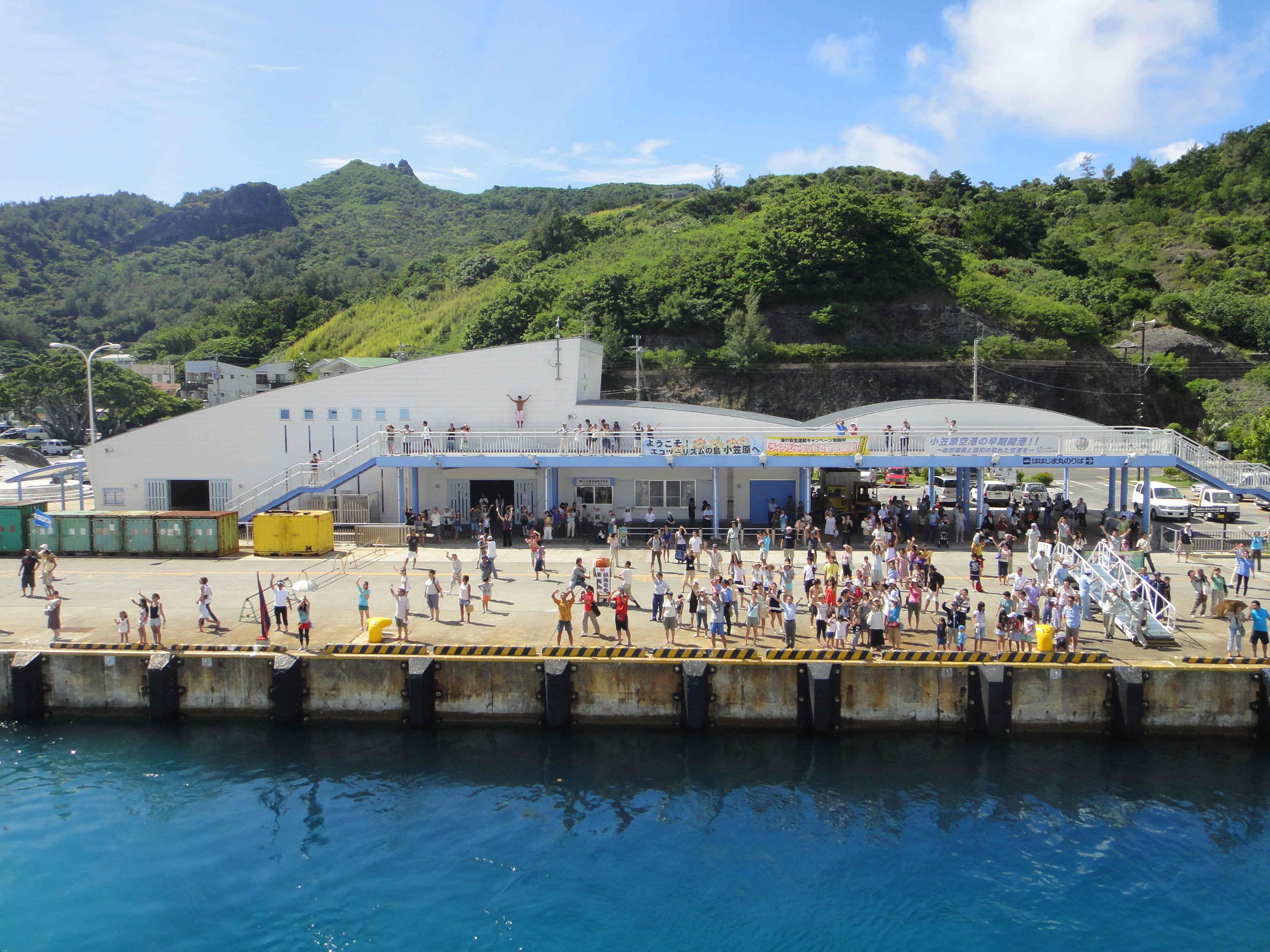 futami port , chichi-jima